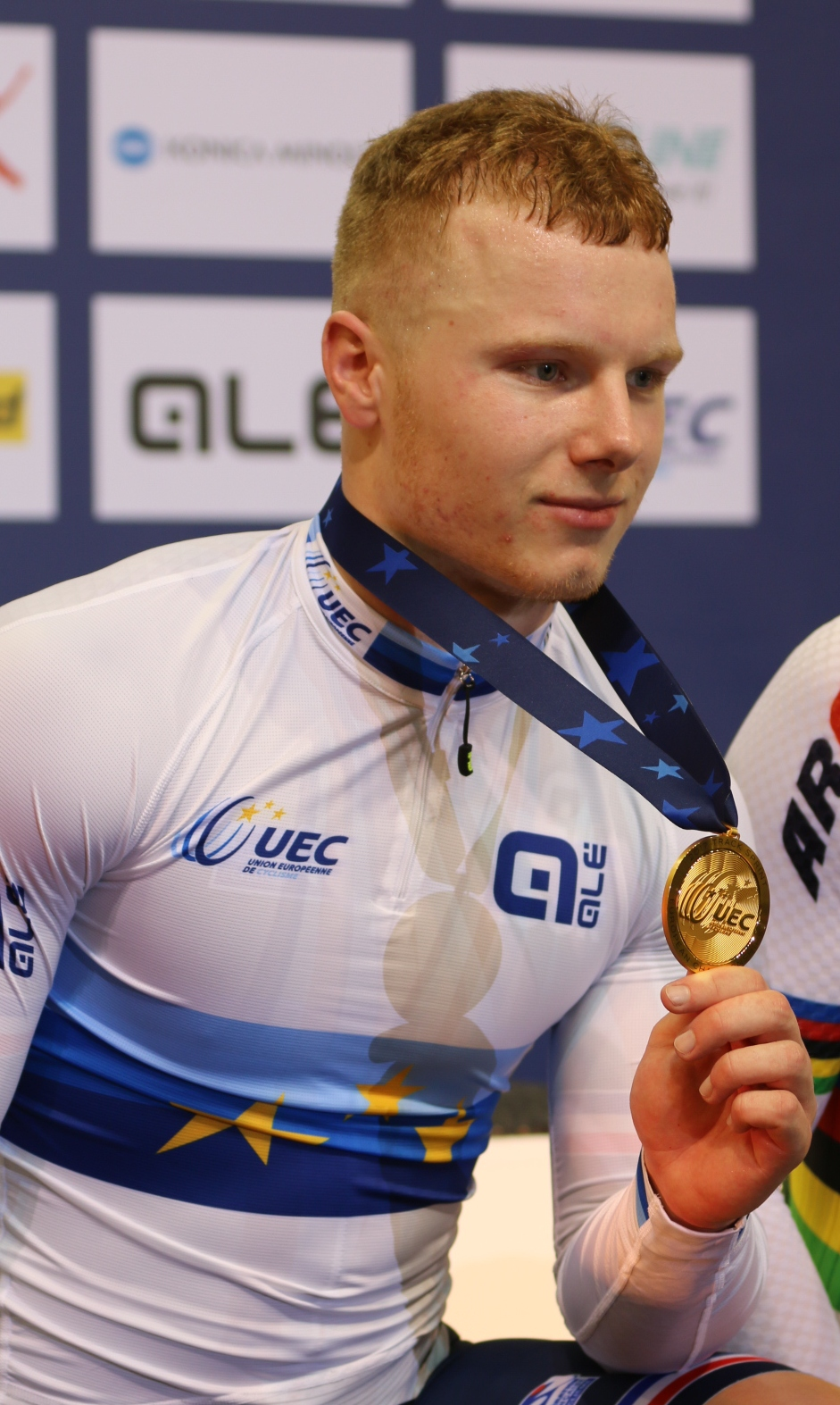 Sébastien Vigier, Europameister im Sprint